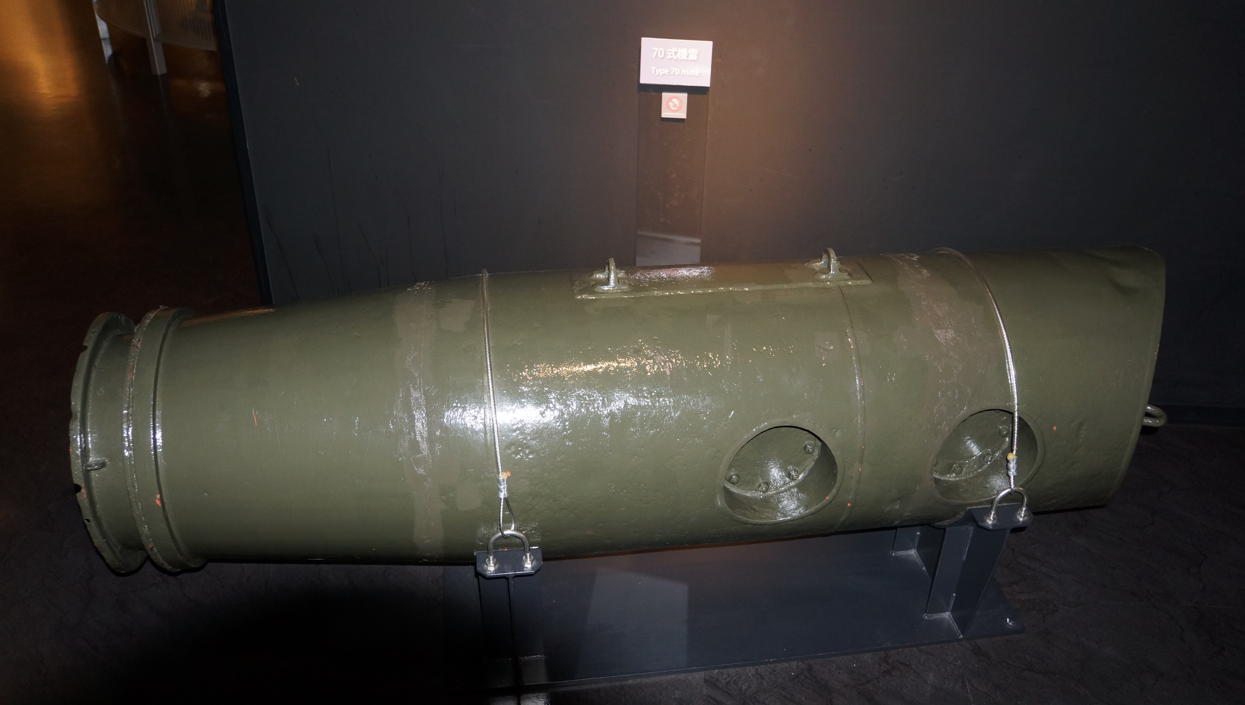 海上自衛隊 70式機雷。 14年9月15日 海上自衛隊呉史料館内にて。